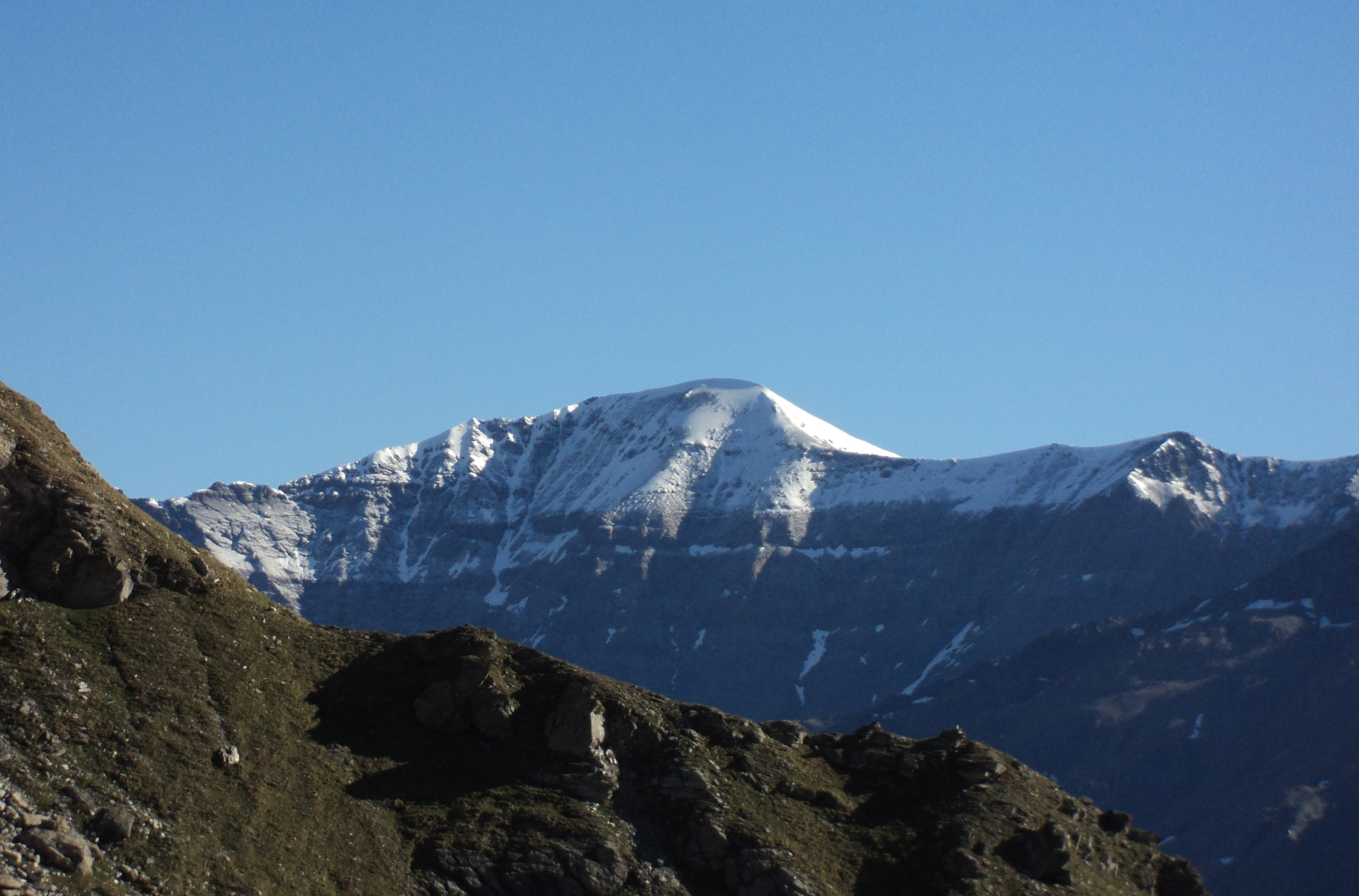 La Punta di Ronce - Versante sud-ovest vista salendo il Monte Giusalet - Alpi Graie